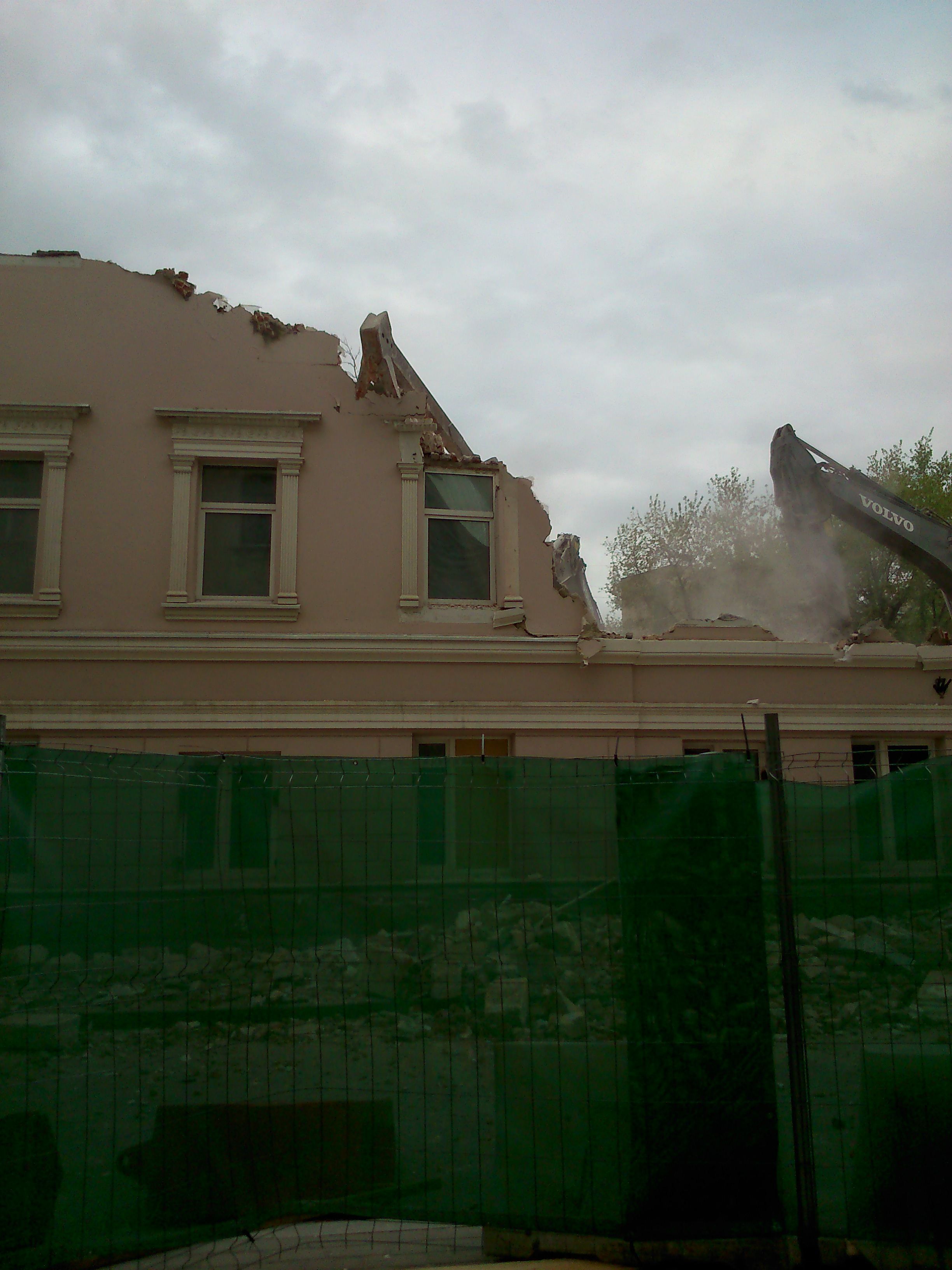 Снос "Дома Неклюдовой". Москва, Малая Бронная, дом № 15Б